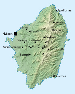 Villes et villages principaux de Naxos / Principal towns and villages of Naxos